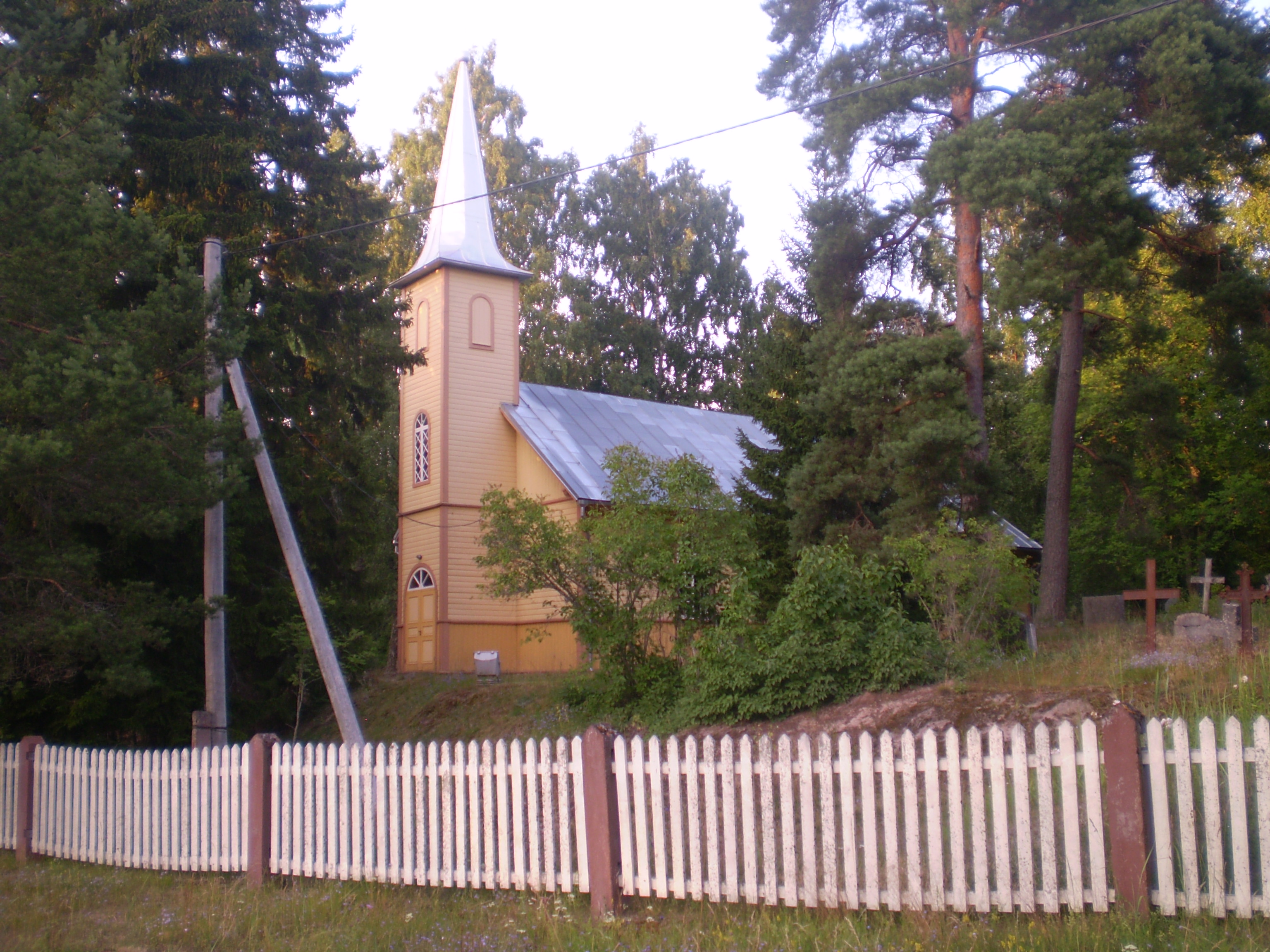 Mänspe kirik